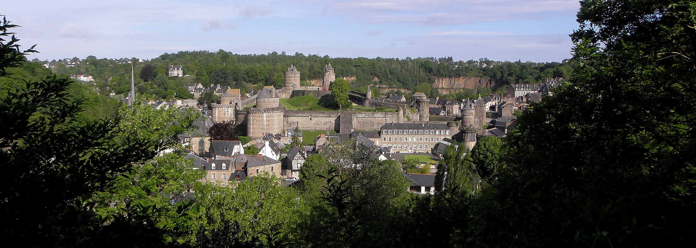 Le château de Fougères (35) vu du Jardin public.